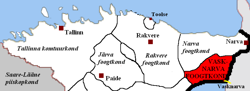 Vasknarva foogtkonna kaart